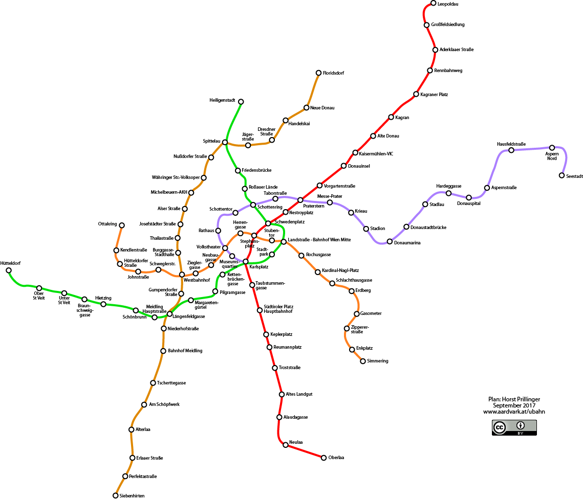 Netzplan der U-Bahn Wien (Stand September 2017)